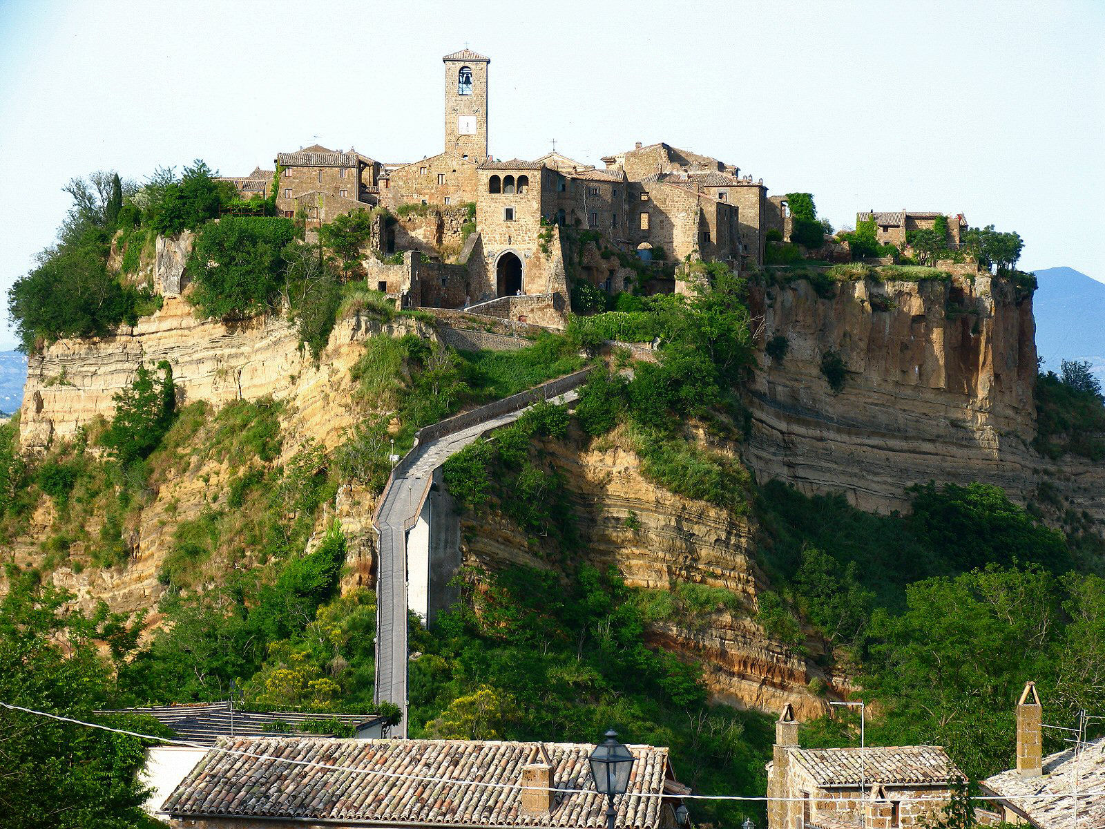 Bagnoregio, Lazio, ItaliaCivita di Bagnoregio , "Città che muore"